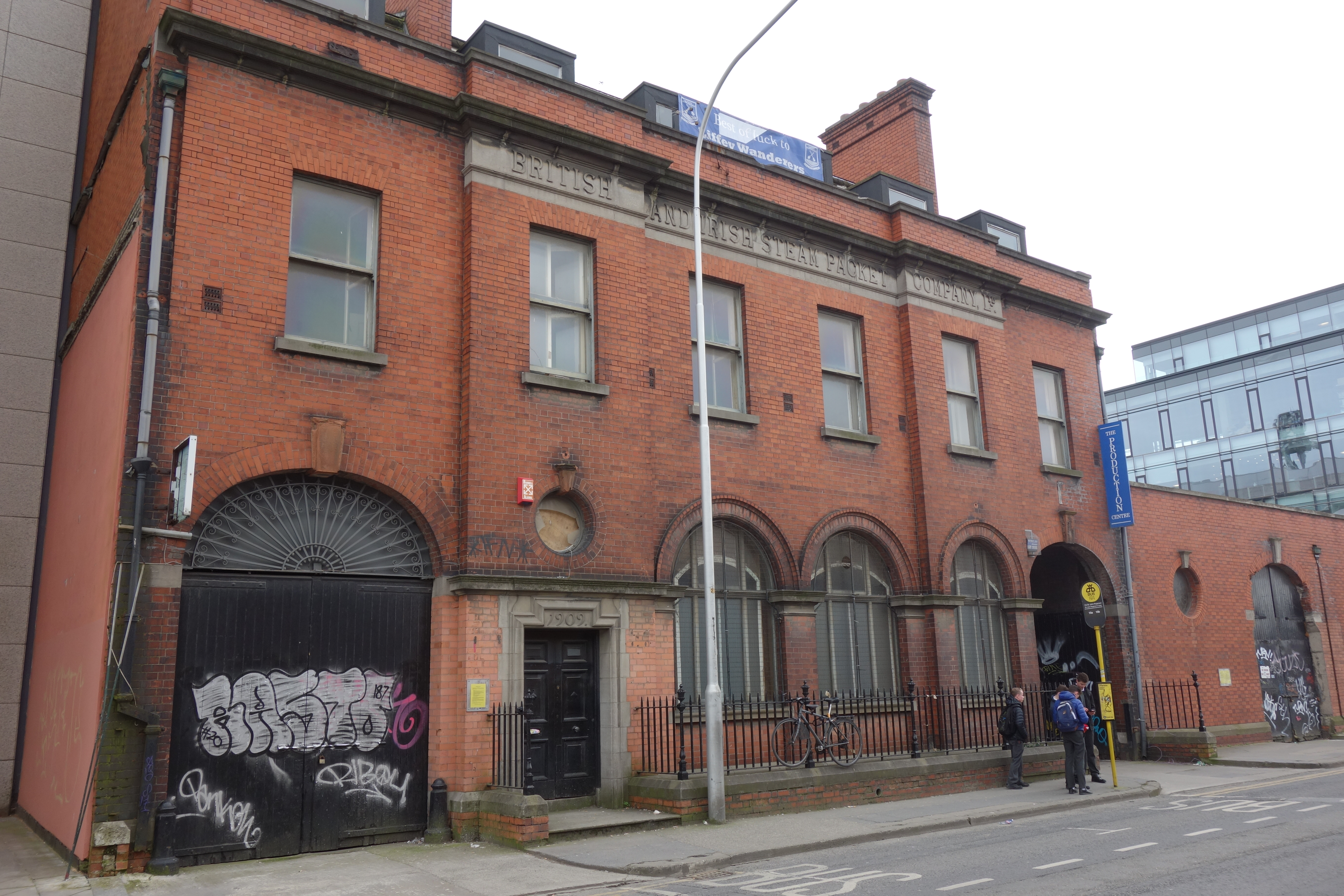 B&I Steampacket Company Office Building, John Rogerson's Quay